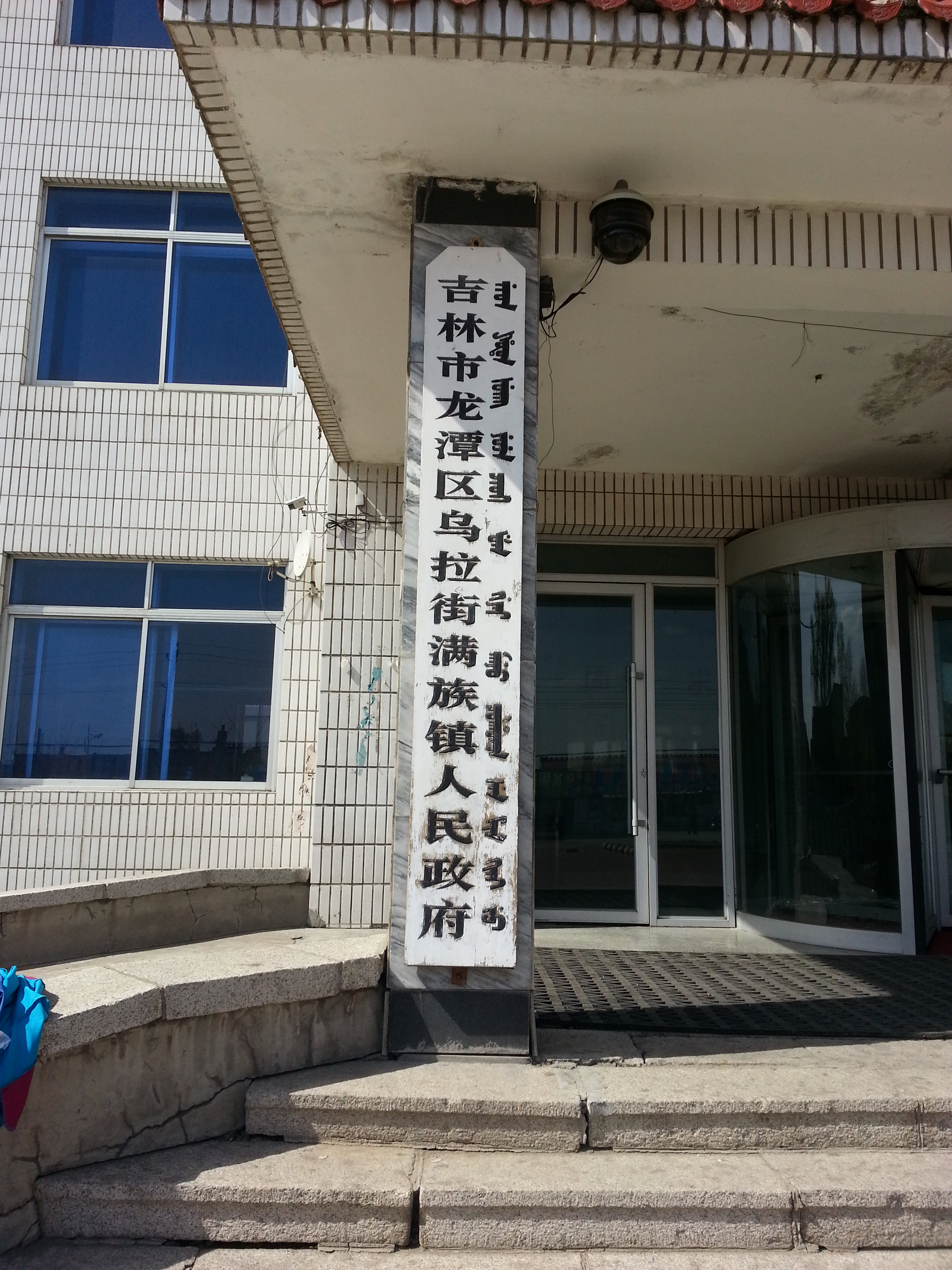 中文（中国大陆）: 吉林市龙潭区乌拉街满族镇政府牌匾